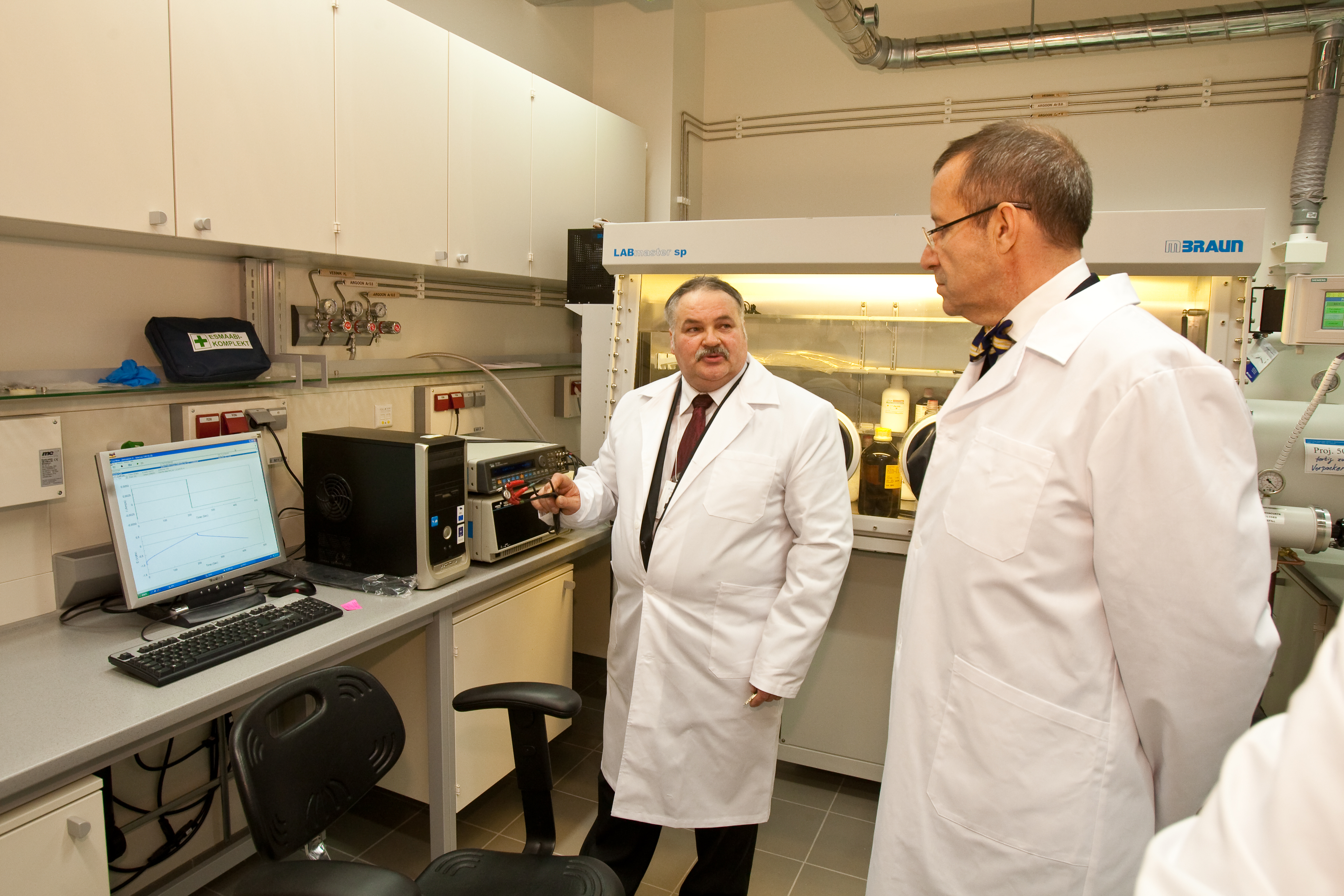 18. jaanuaril 2010 külastas EV president Toomas Hendrik Ilves TÜ Chemicumi. Pildil TÜ loodus- ja tehnoloogiateaduskonna keemia instituudi direktor, professor Enn Lust (vasakul) ja EV president Toomas Hendrik Ilves.